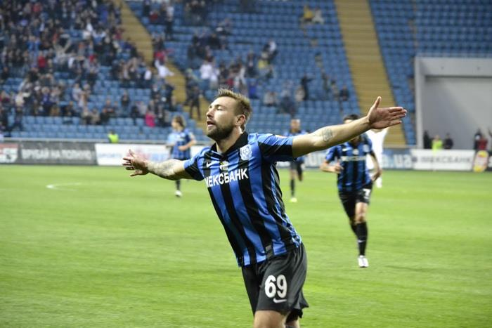 Олексій Антонов святкує гол у ворота київського Динамо, 25 квітня 2014 року